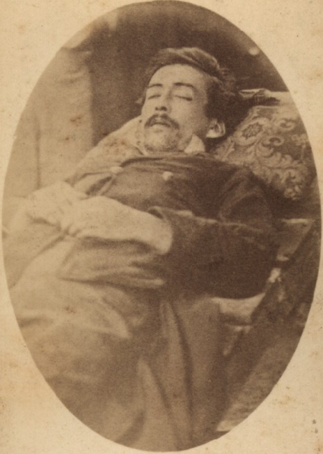 Santiago Pizarro, marido de la Sargento Irene Morales, fusilado por los bolivianos el 24 de septiembre de 1878. [fotografía]. Chile : [s.n., 1878]. 1 fotografía : monocromo, albúmina sobre papel fibra, carte de visite ; 6,3 X 10,4 cm. .